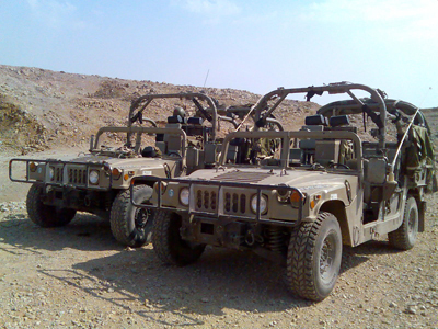 האמר ברקן, בשימוש ביחידת סטינגר.